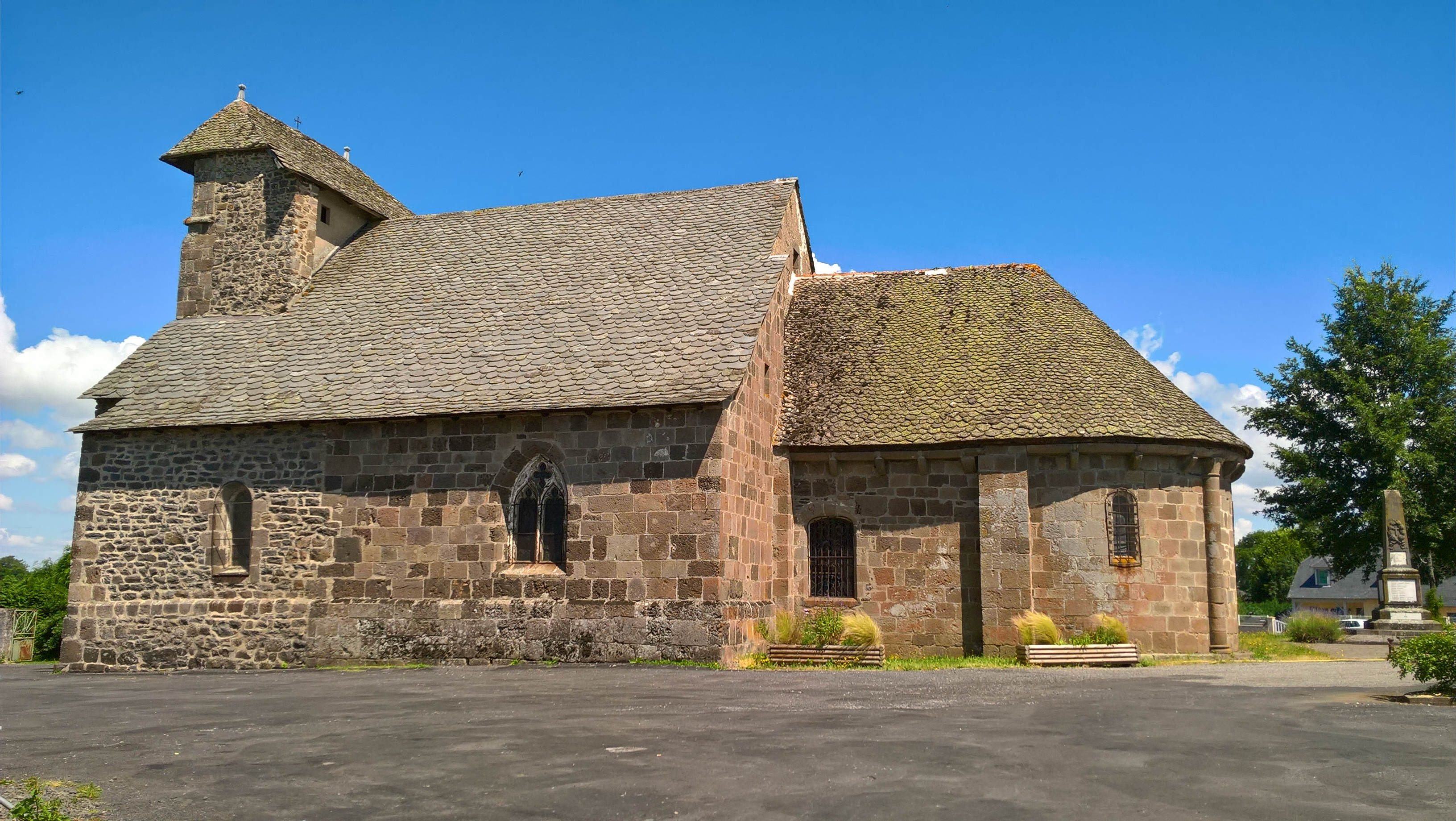 Le Vigean, église St-Laurent, sud .